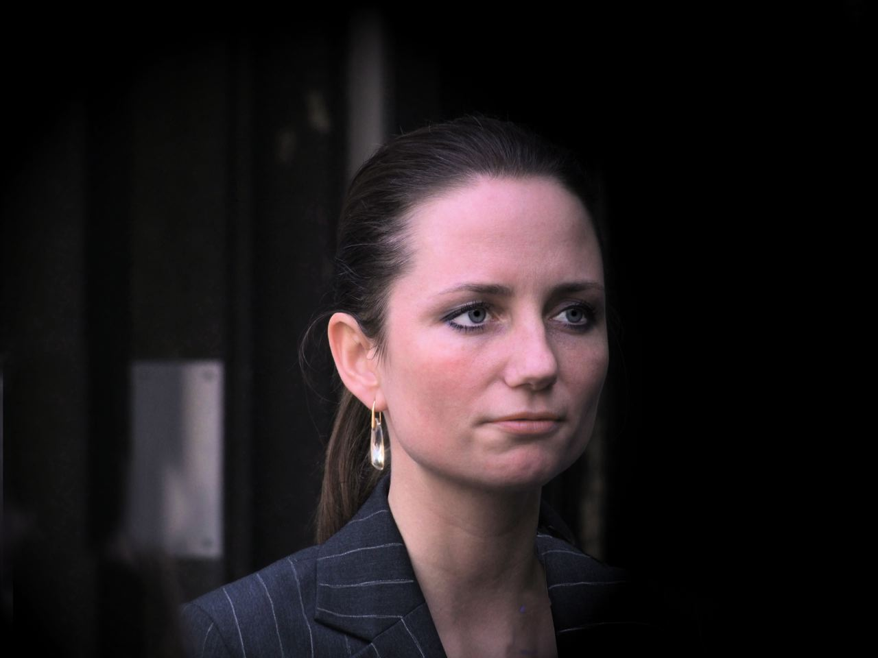 Marie-Fleur (Fleur) Agema (Purmerend, 16 september 1976) is een Nederlands politica. Namens de Partij voor de Vrijheid maakt ze sinds de Tweede Kamerverkiezingen 2006 deel uit van de Tweede Kamer der Staten-Generaal. Ze werd op 30 november 2006 beëdigd.